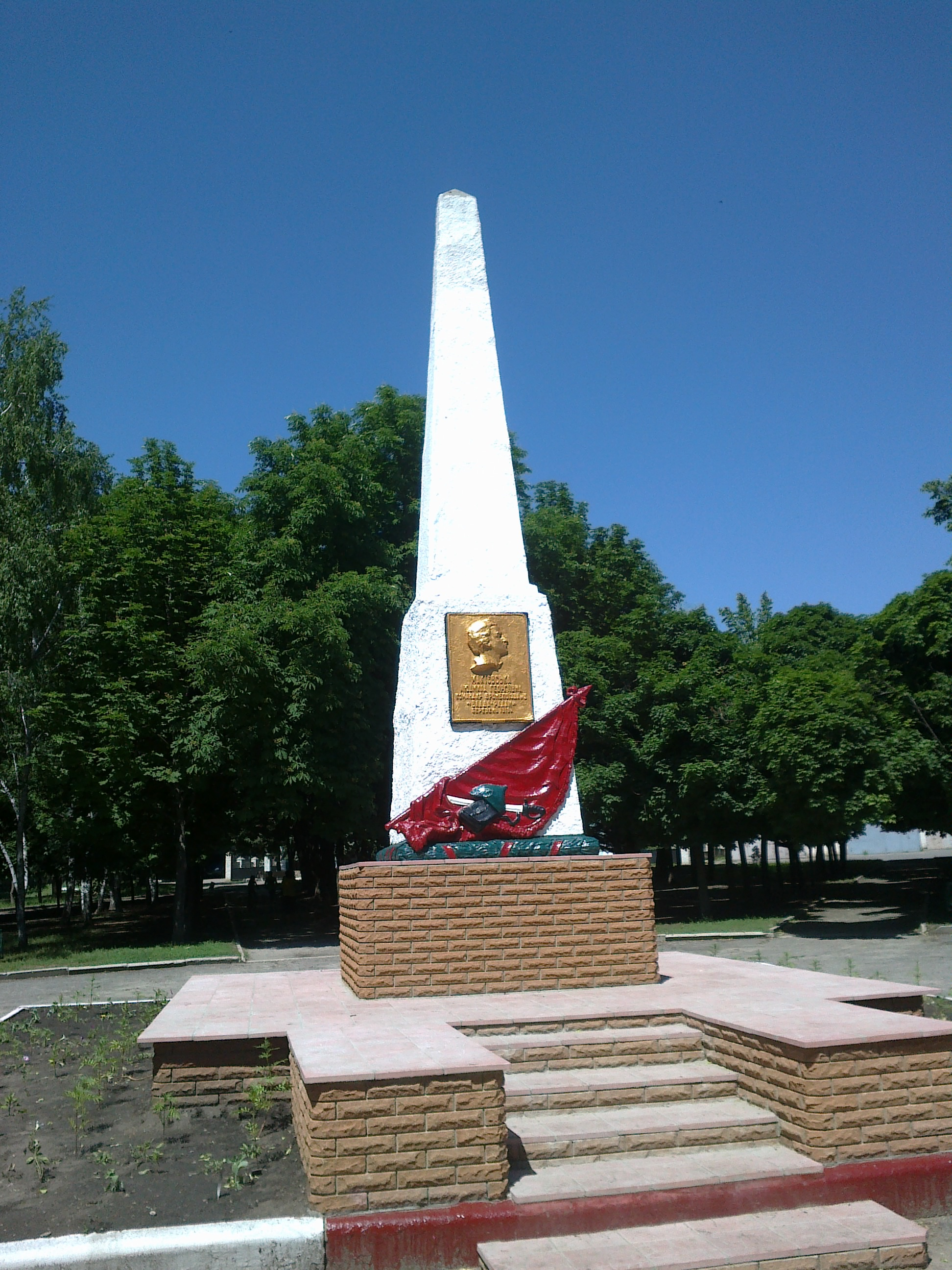 Пам'ятник командиру бронепоїзда Л.Г. Мокієвській, Куп'янськ, вул. Леніна, 19, парк ім. Л.Г. Мокієвської